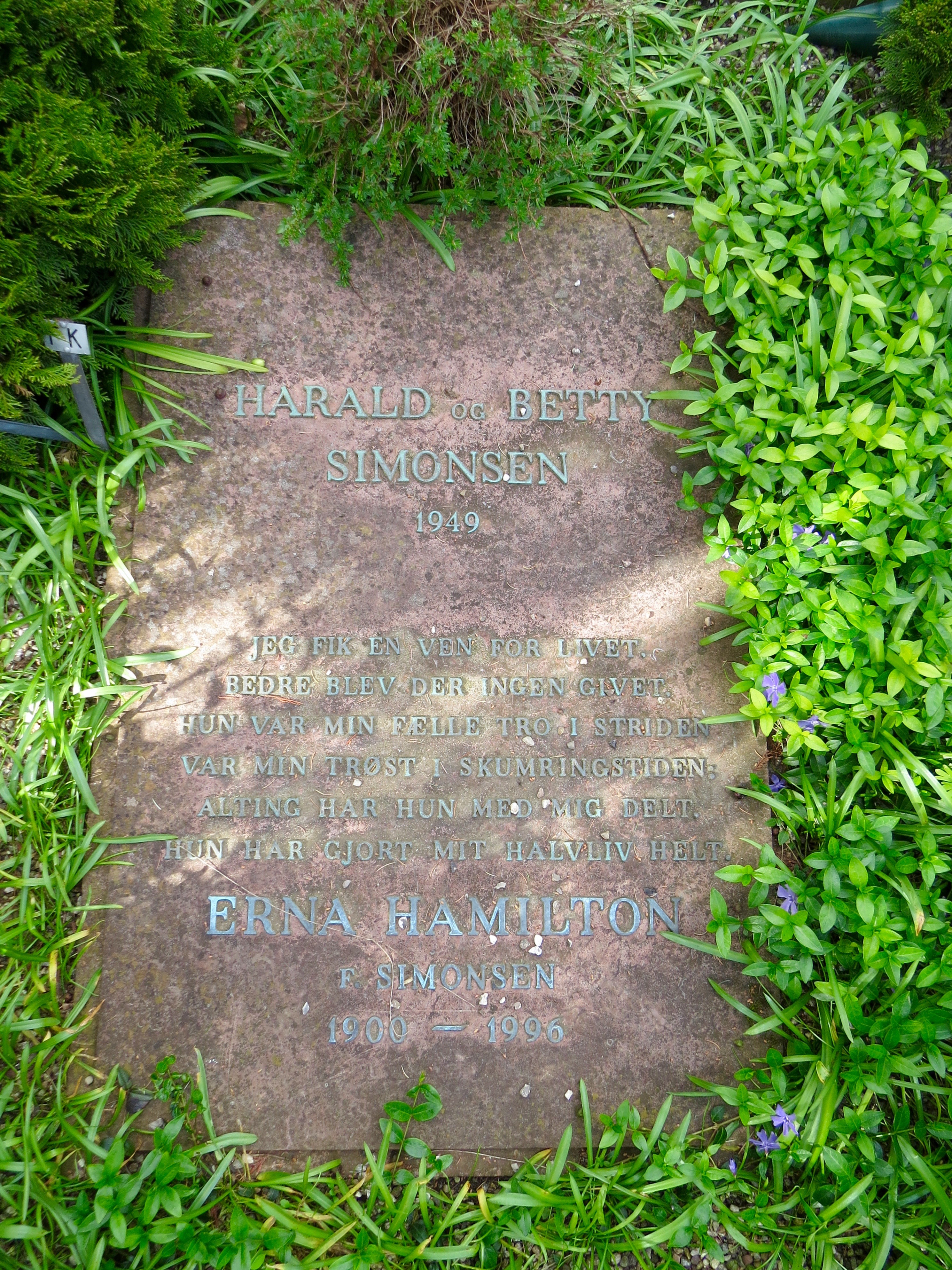 Gravminde for Harald og Betty Simonsen, samt for datteren Erna Hamilton, Frederiksberg Ældre Kirkegård